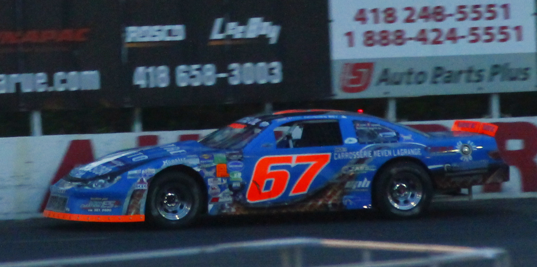 Dominic Jacques - Série Sportsman Québec - Autodrome Montmagny - 27 juin 2015 (photo Paul-Émile Poulin-Jacques)